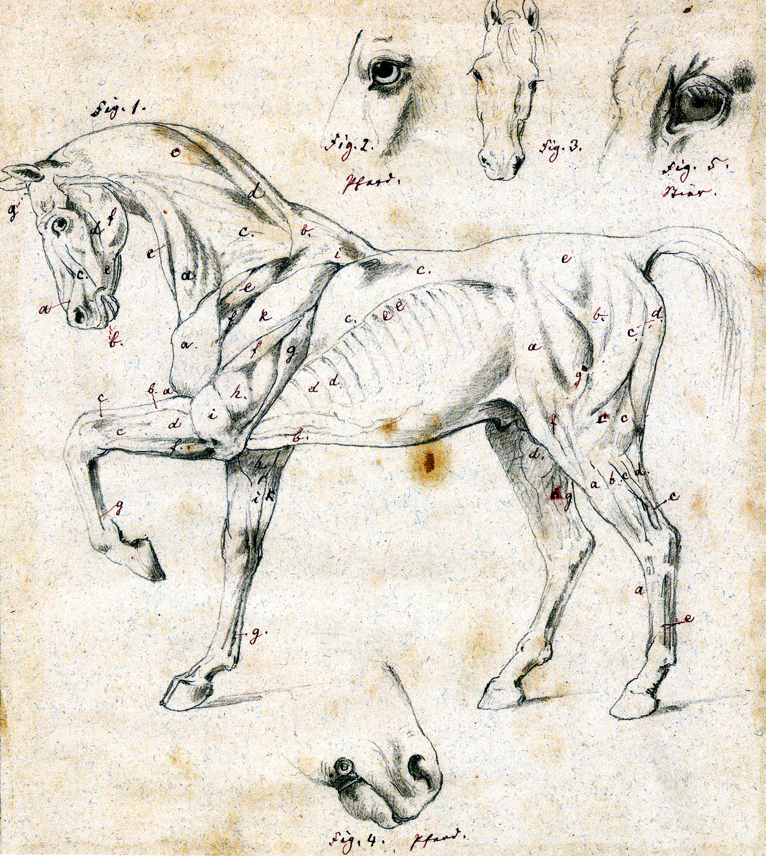 Abbildung aus dem Werk Johann Friedrich Leus über die Wirbeltiere Europas